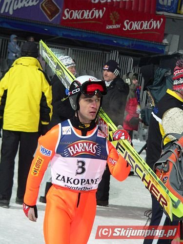 Marcin Bachleda - polski skoczek narciarski podczas Pucharu Świata w skokach narciarskich Zakopane 2006.